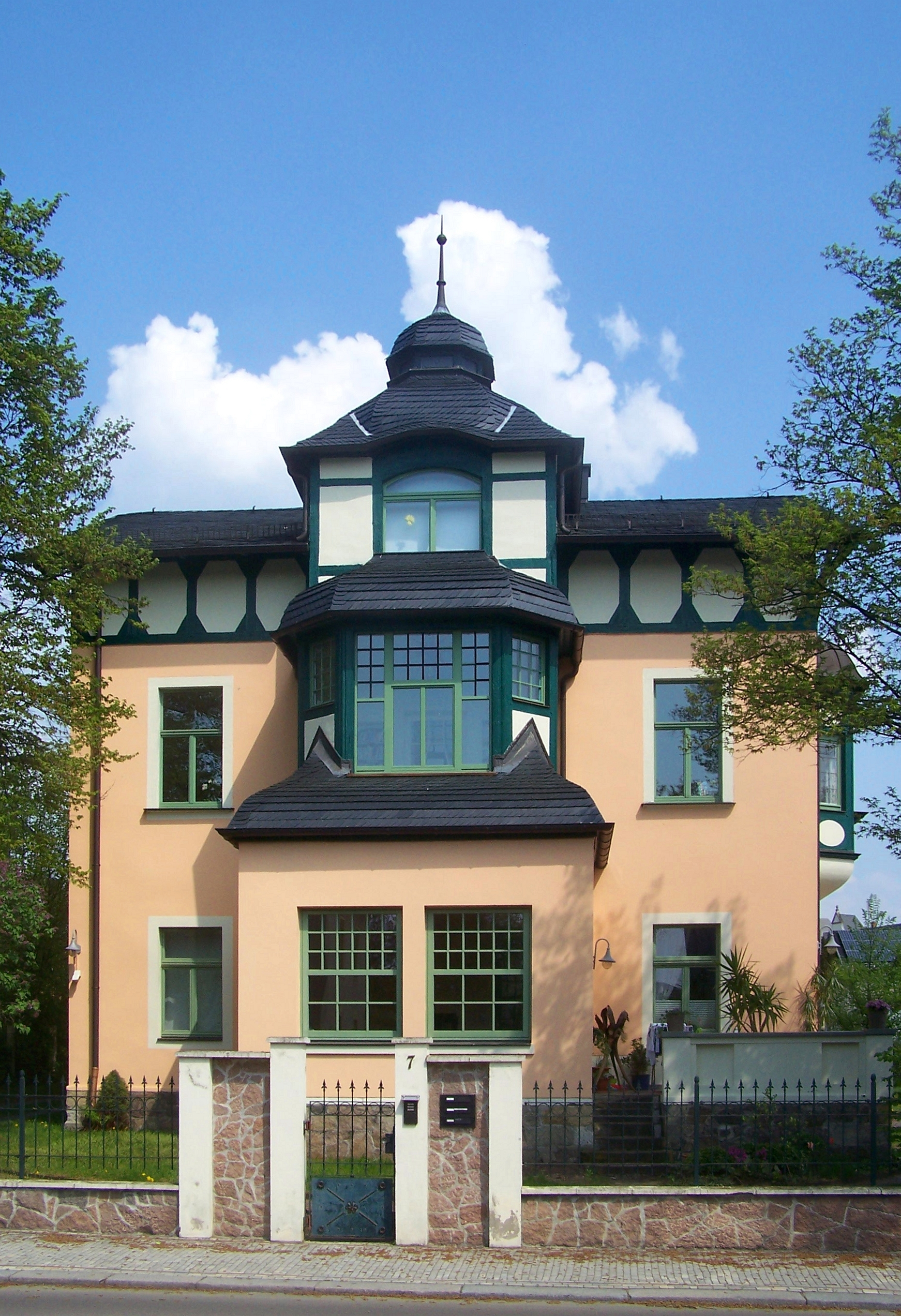 Mietvilla Gellertstraße 7 (Villa Selma) in Radebeul